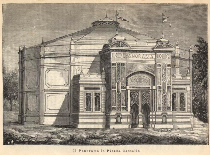 Il Panorama di piazza Castello a Milano (1881) arch Luigi Broggi, costruzioe effimera realizata per la Esposizione Nazionale di Milano 1881